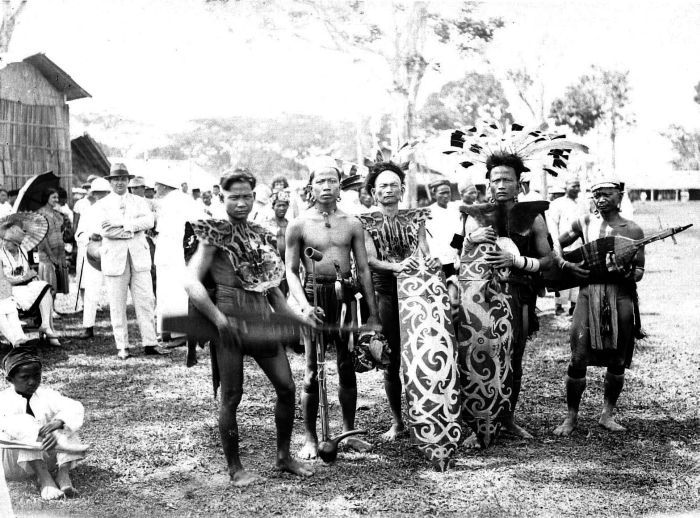 Repronegatief. Dayak tijdens het erau feest (een cultureel festival) in Tenggarong.